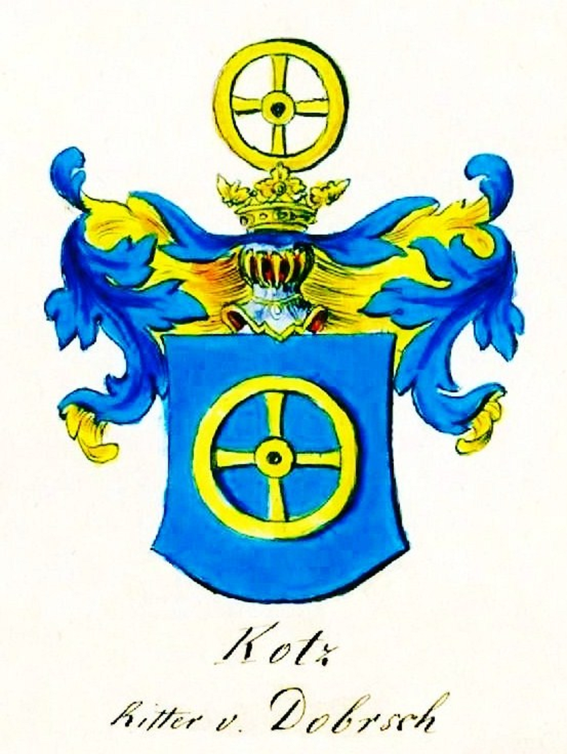 Wappen der „Kotz Ritter v. Dobrsch“ (Kotz von Dobrz; Kocové z Dobrše)